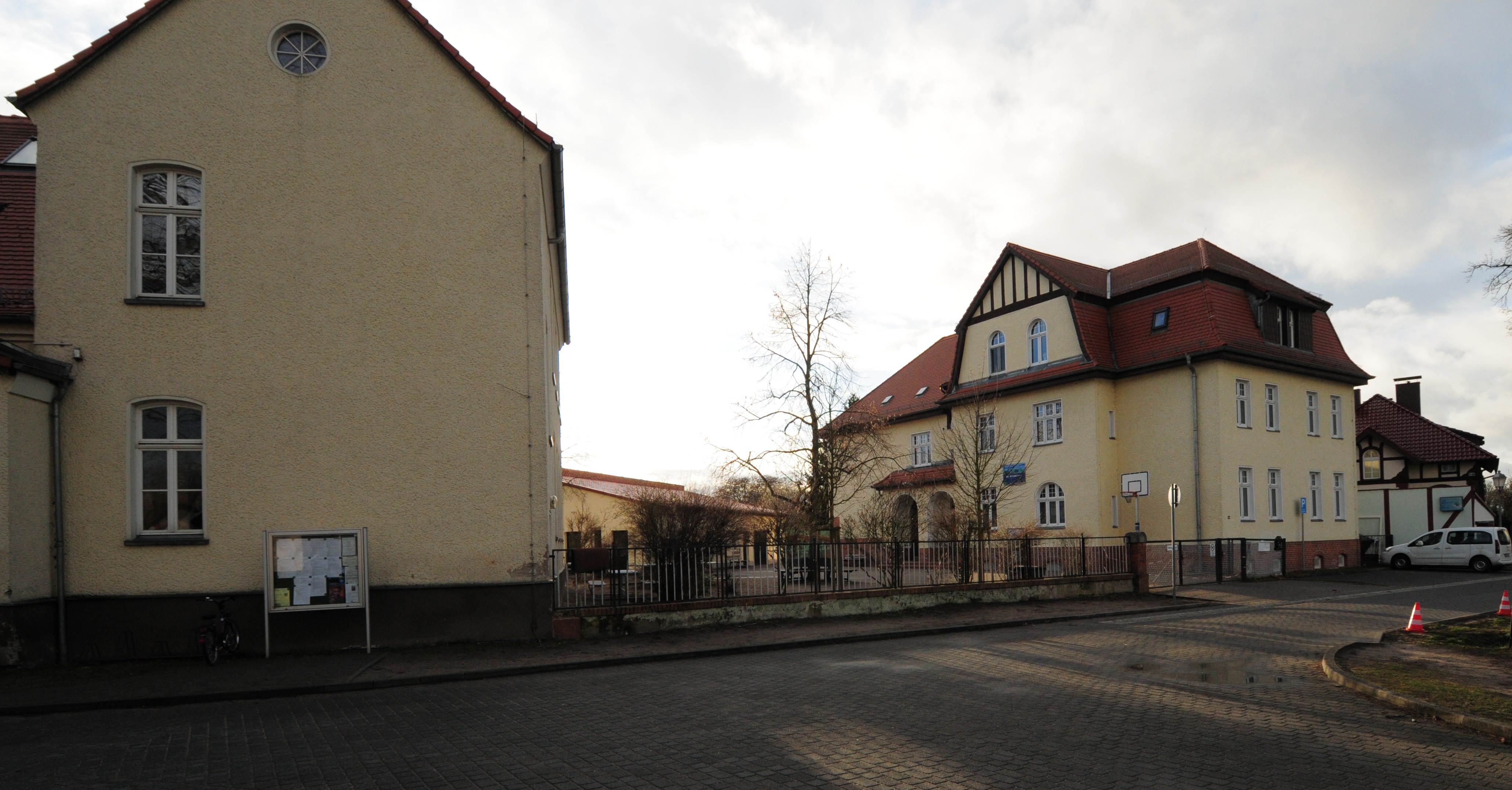 Senzig (Ortsteil von Königs Wusterhausen), Grundschule von Senzig am Dorfanger